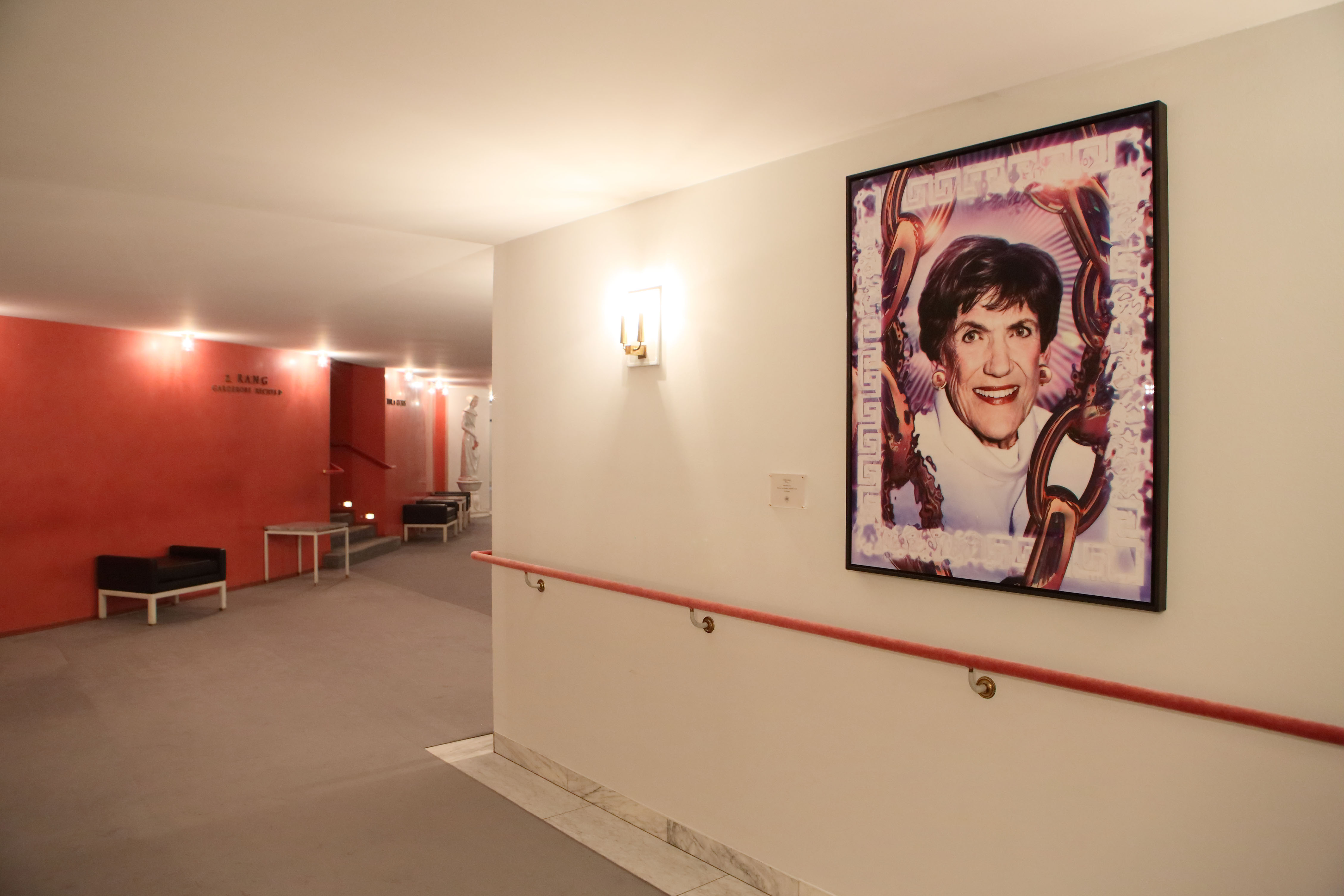 Die Portraitgalerie des Nationaltheaters München zeigt Sängerpersönlichkeiten. Das Portrait der Opernsängerin Inge Borkh schuf der Künstler Till Janz.